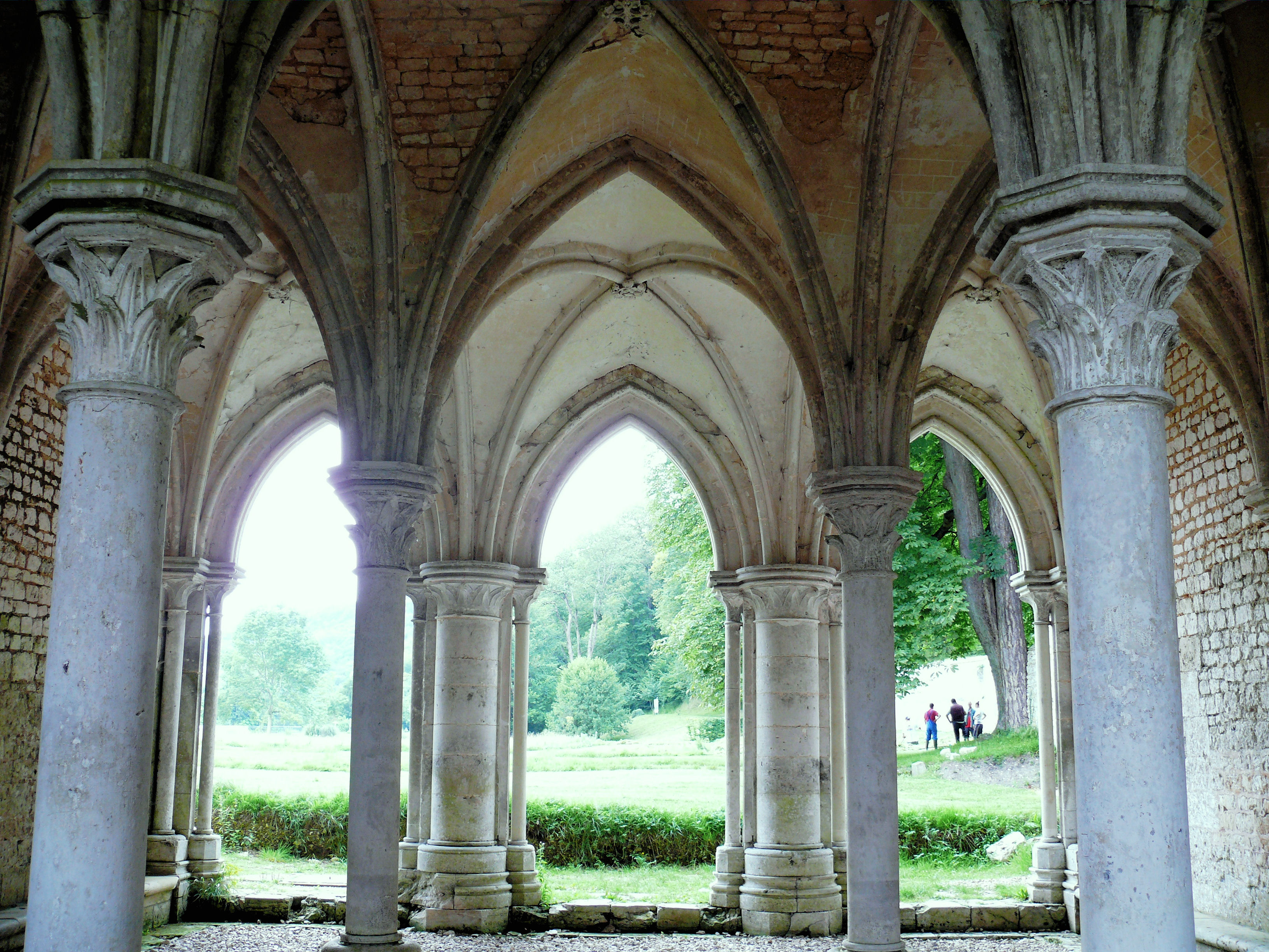 Abbaye Notre-Dame de Fontaine-Guérard - Salle capitulaire